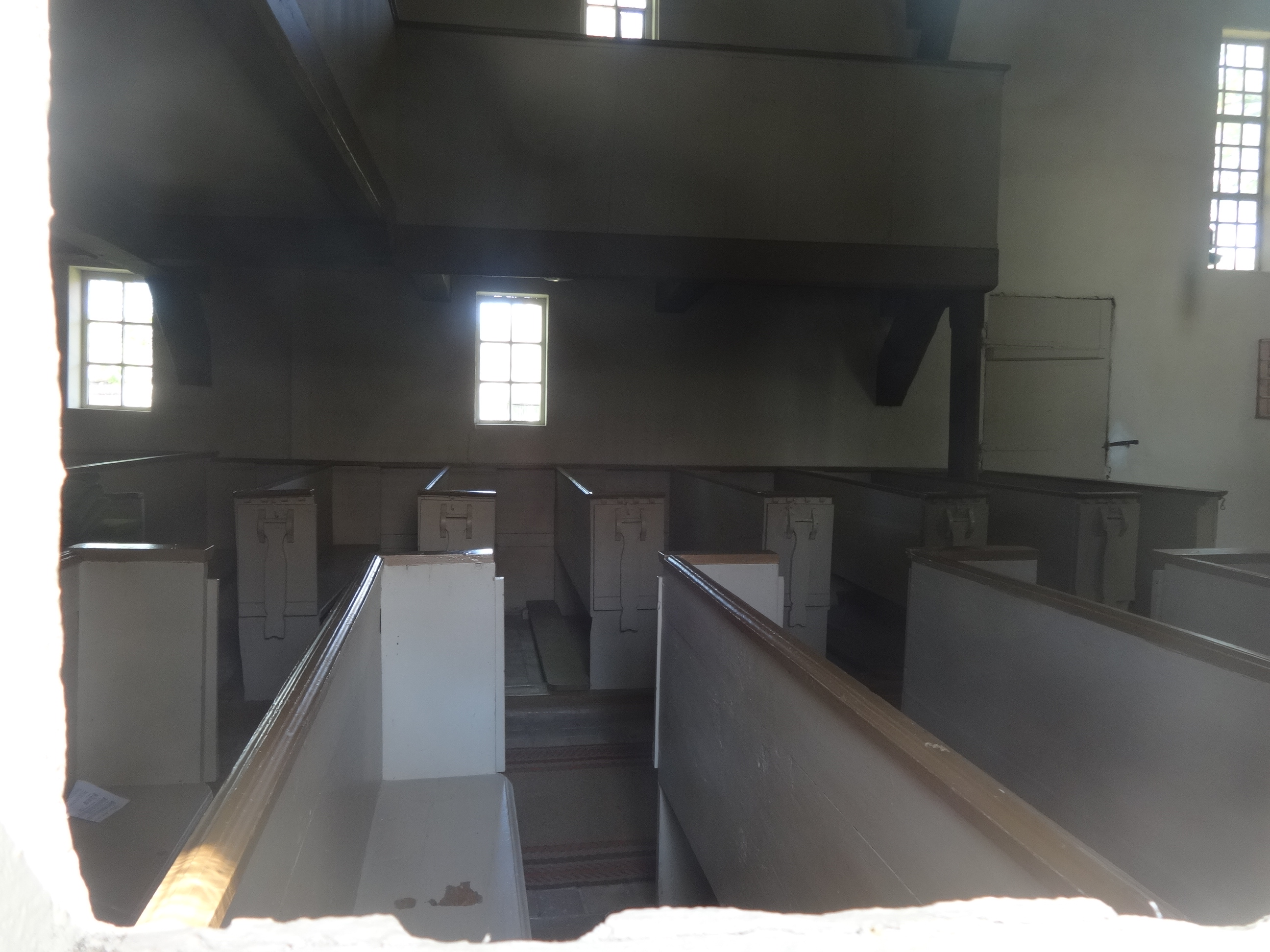 Die Dorfkirche Groß Schauen entstand in der ersten Hälfte des 18. Jahrhunderts in Fachwerkbauweise. 1822 fügte die Kirchengemeinde ein Glockenhaus an und ließ eine Empore sowie einen Kanzelaltar einbauen.